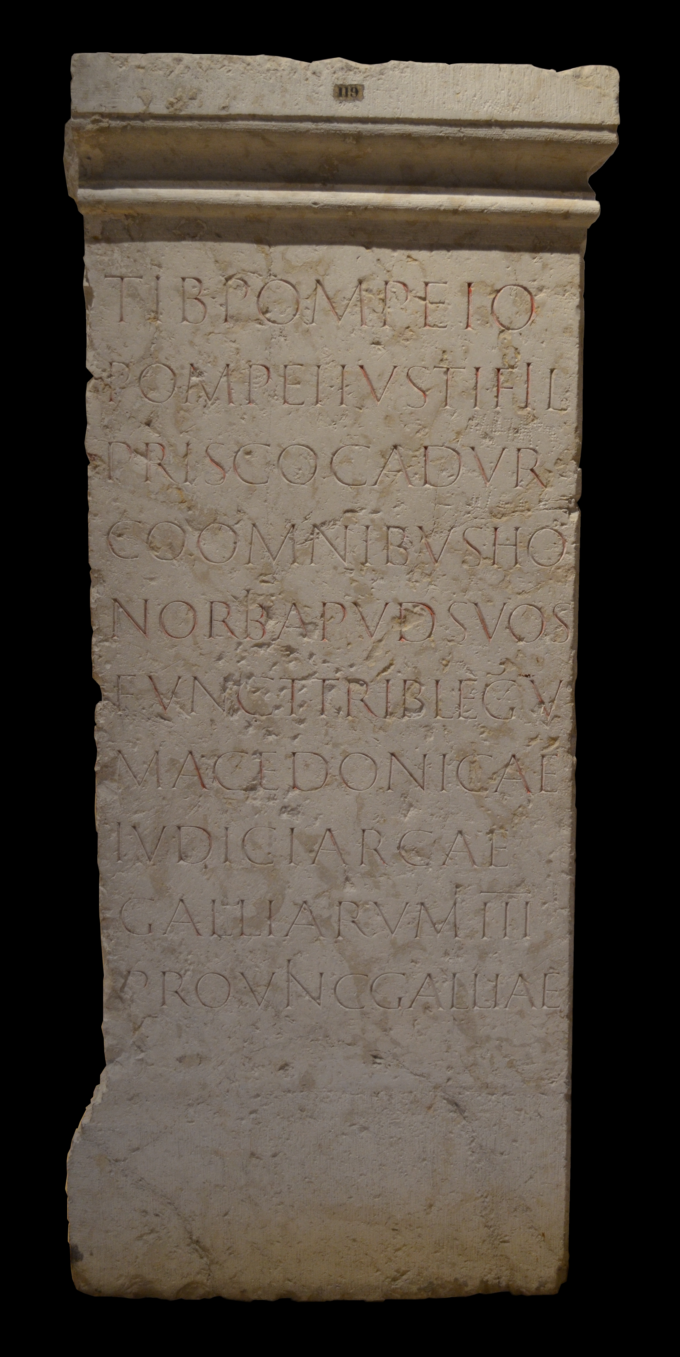 Musée gallo-romain de Fourvière (Lyon) - Piédestal de statue avec base et couronnement remployé à côté du grand autel de l'église de Saint-Pierre-les-Nonains à Lyon au XVIe siècle. Haut. 217cm. Tib(erio) Pompeio / Pompeii Iusti fil(io) / Prisco Cadur/co omnibus h/onoribus, apud suos / funct(o) trib(uno) leg(ionis) V / Macedonicae / iudici arcae / Galliarum III / provinc(iae) Galliae : A Tiberius Pompeius Priscus, fils de Pompeius Justus, Cadurque, promu dans sa cité à tous les honneurs, tribun de la Legio V Macedonica, juge de la caisse des Gaules, les Trois provinces des Gaules (ont élevé cette statue).